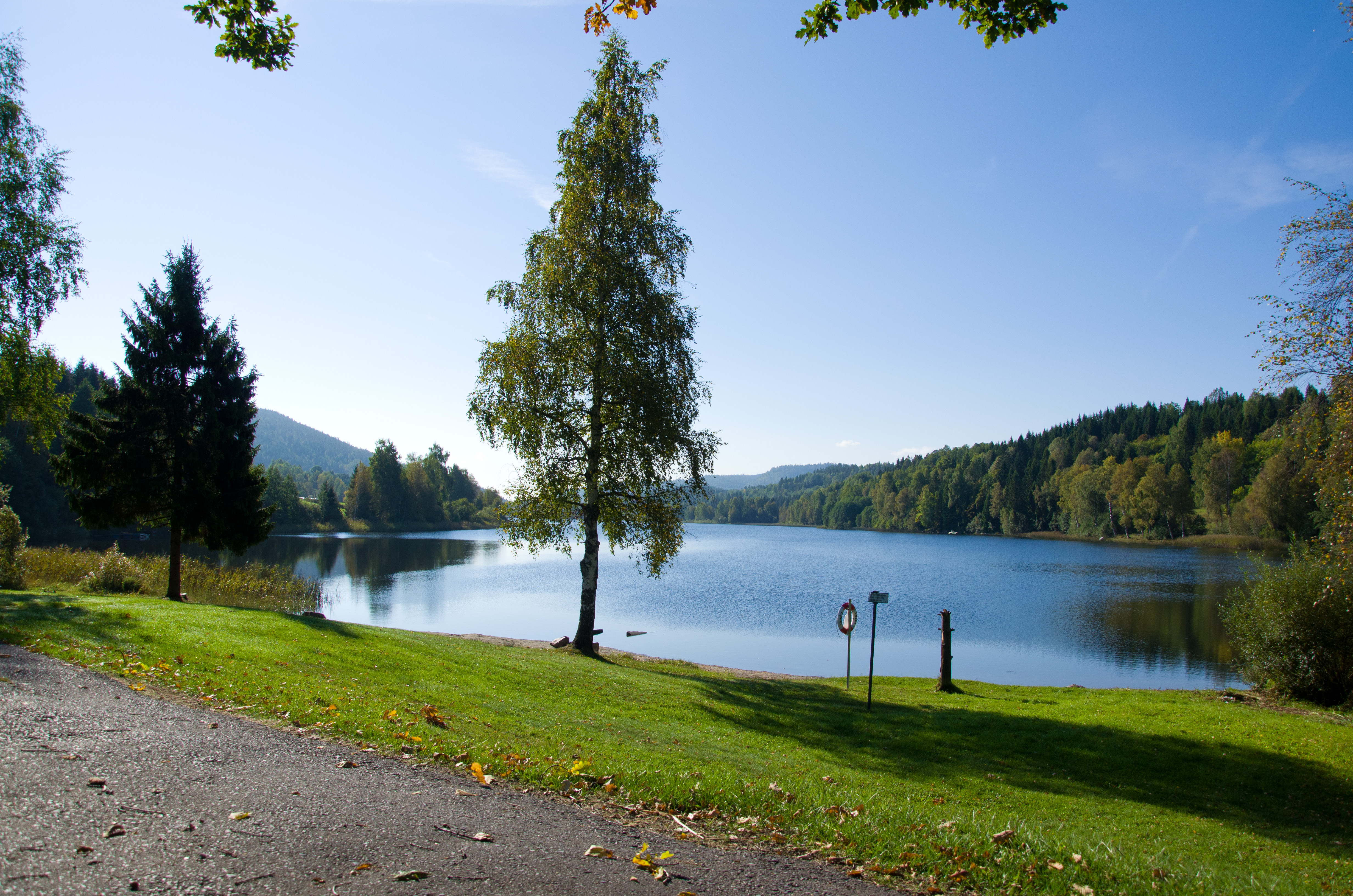 Bergsvannet ved Vassåsveien i Hof i Vestfold. Ikke det samme som Bergsvannet ved Eidsfoss.